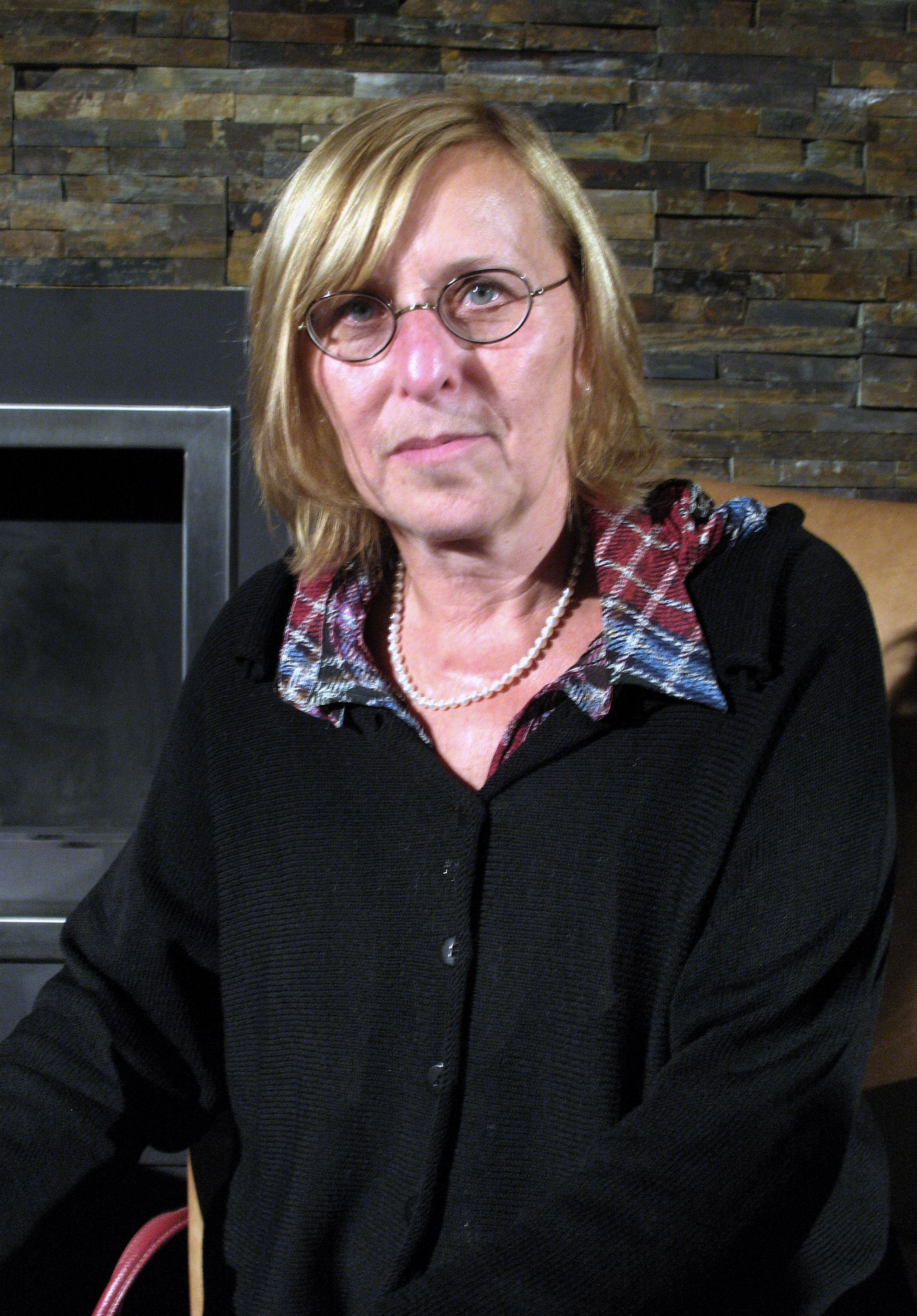 Evelyn Schmidt, 07.09.2009